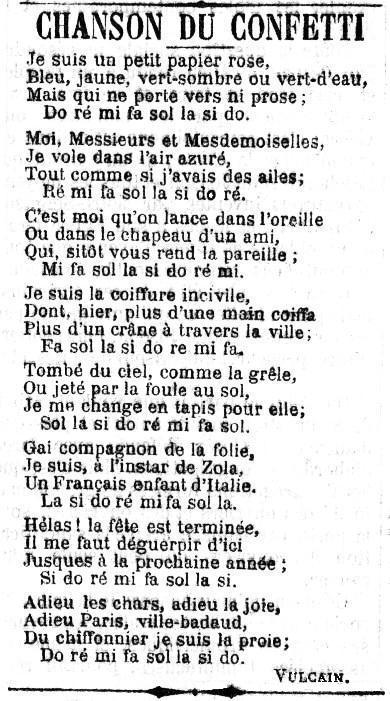 Un poème sur le confetti publié le lendemain de la Mi-Carême dans le journal La Croix.